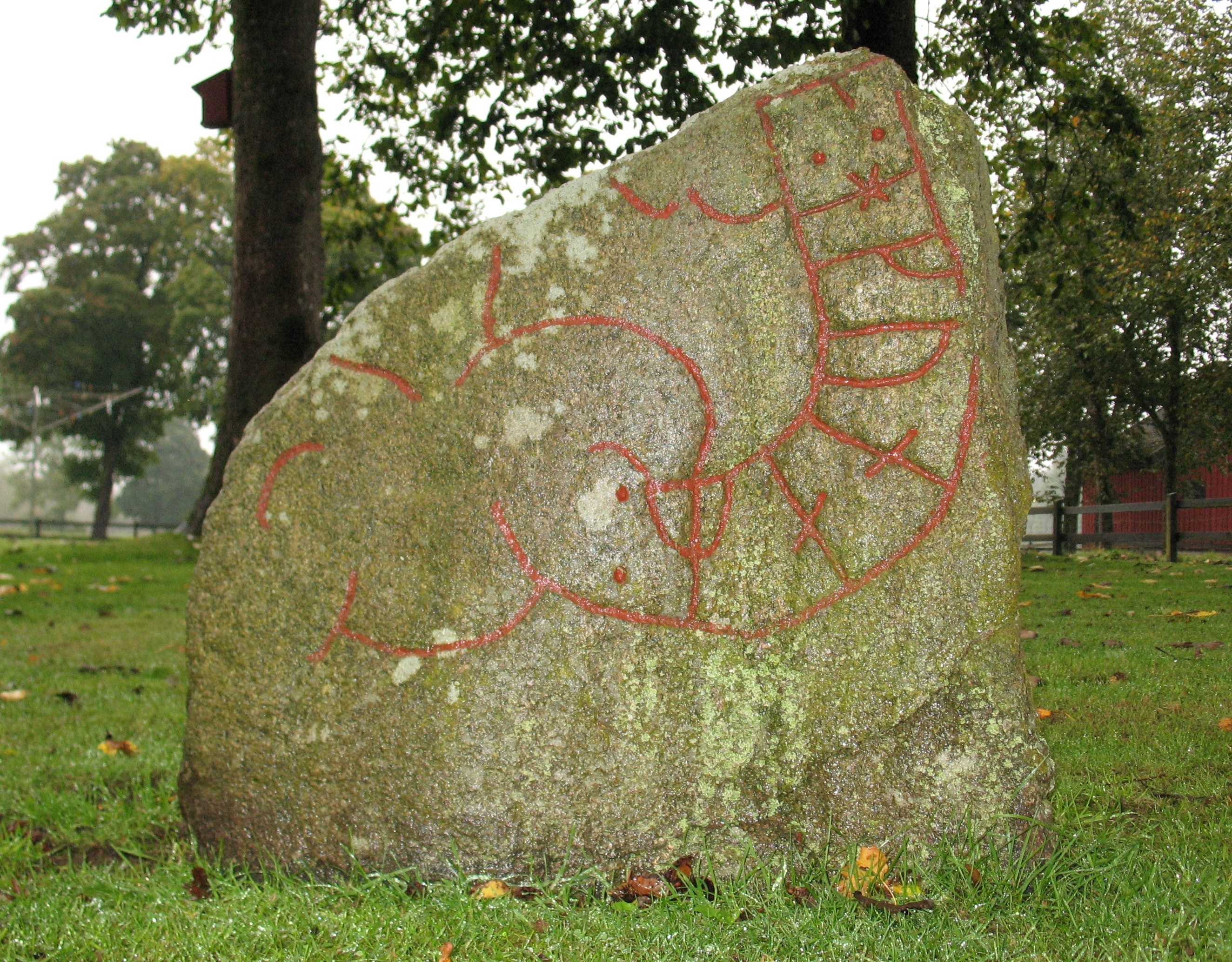 Runestone Sm 76.